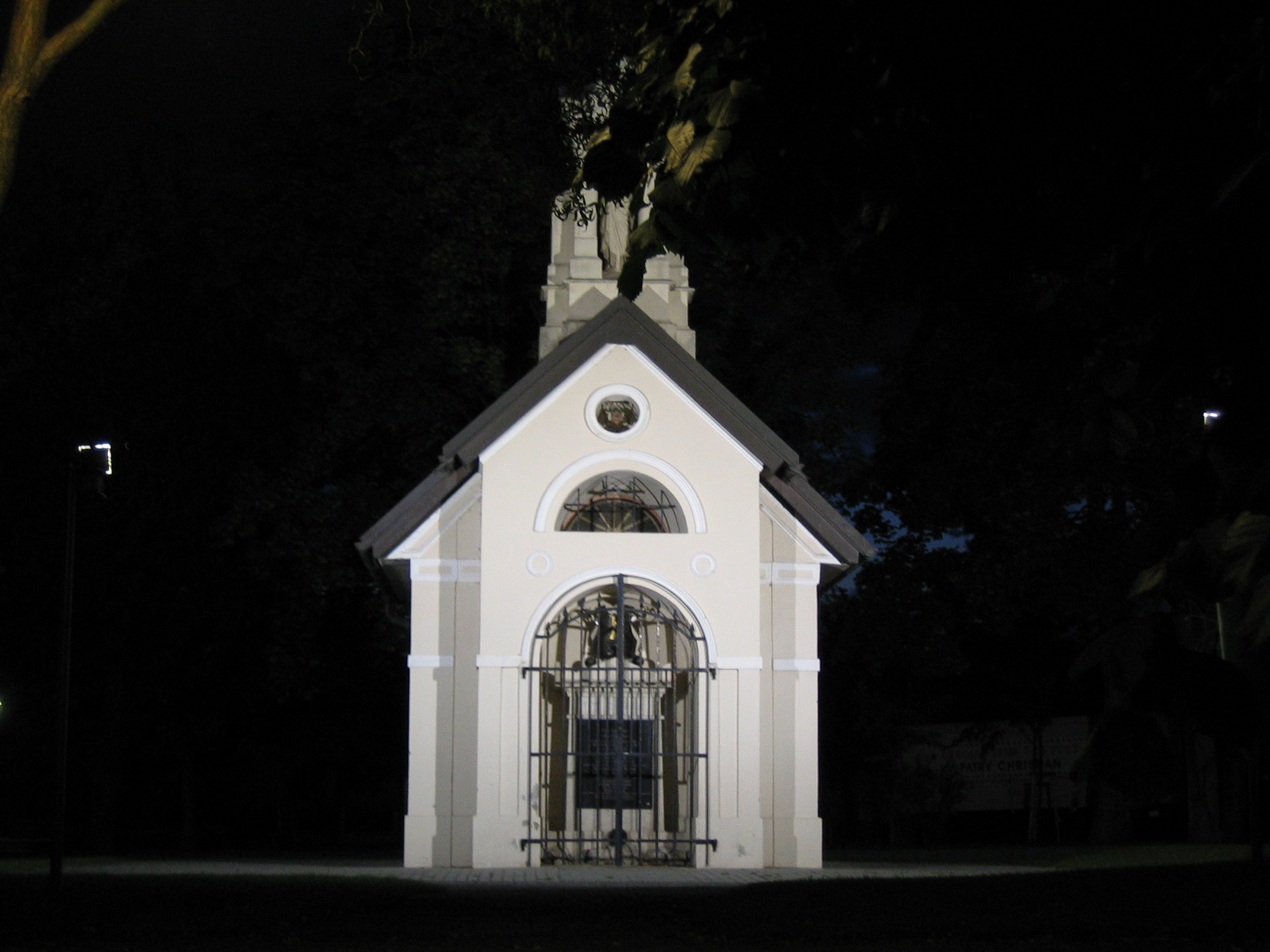 Monumentalkapelle Wagram